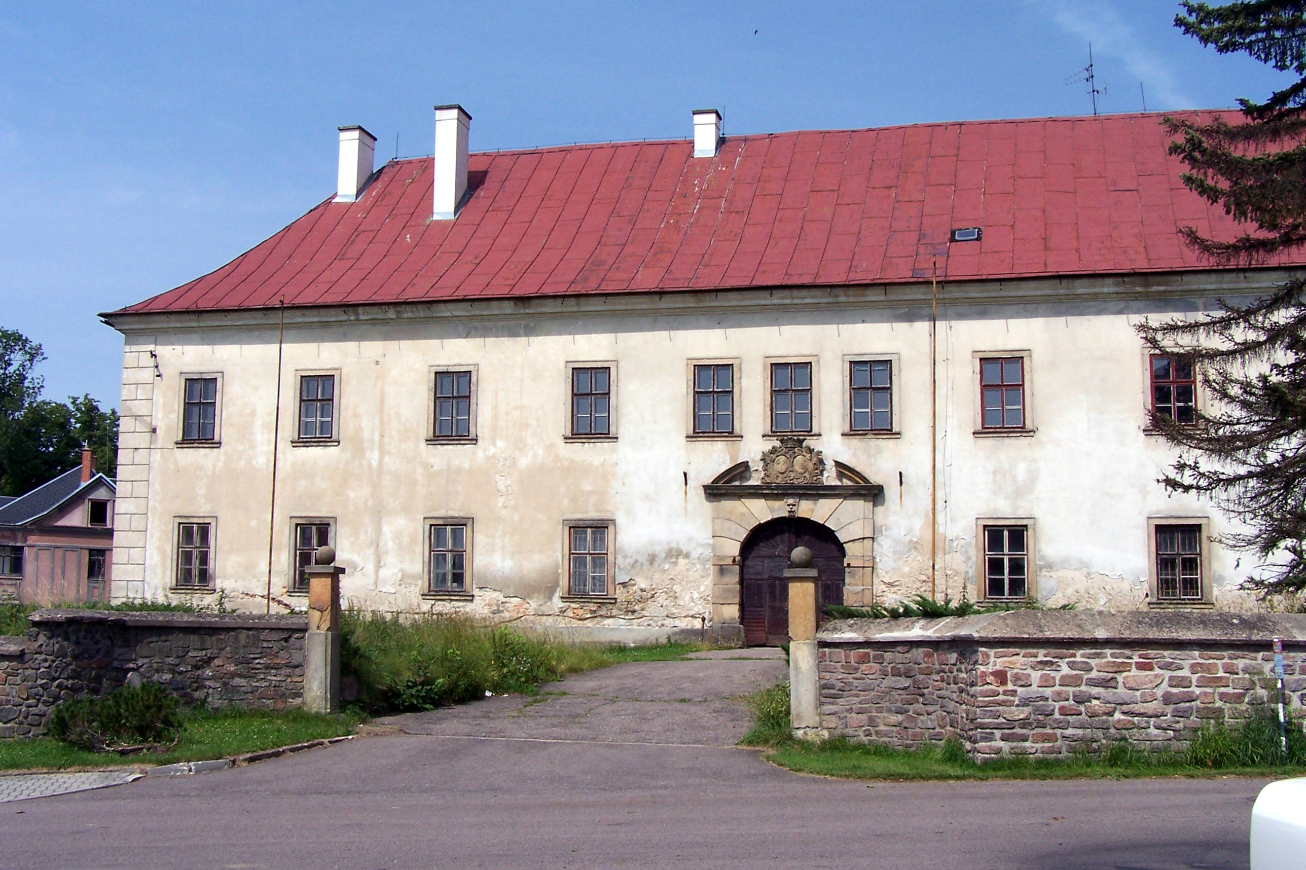 Zámek.